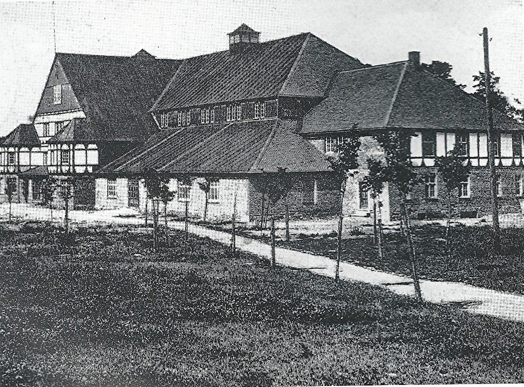 Brilon, Schützenhalle alt